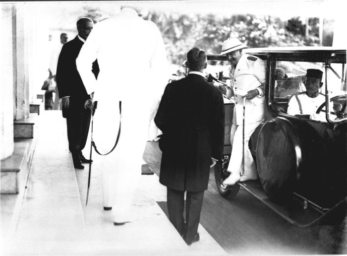 Foto. Aangeboden aan Zijne Excellentie den Gouverneur-Generaal van Nederlandsch-Indië ter gelegenheid van de opening der Rechts Hoogeschool te Batavia. Opening van de Rechtshogeschool op 28 oktober 1924 te Batavia. De aankomst van Z.E. de G.G.Mr. D.Fock.